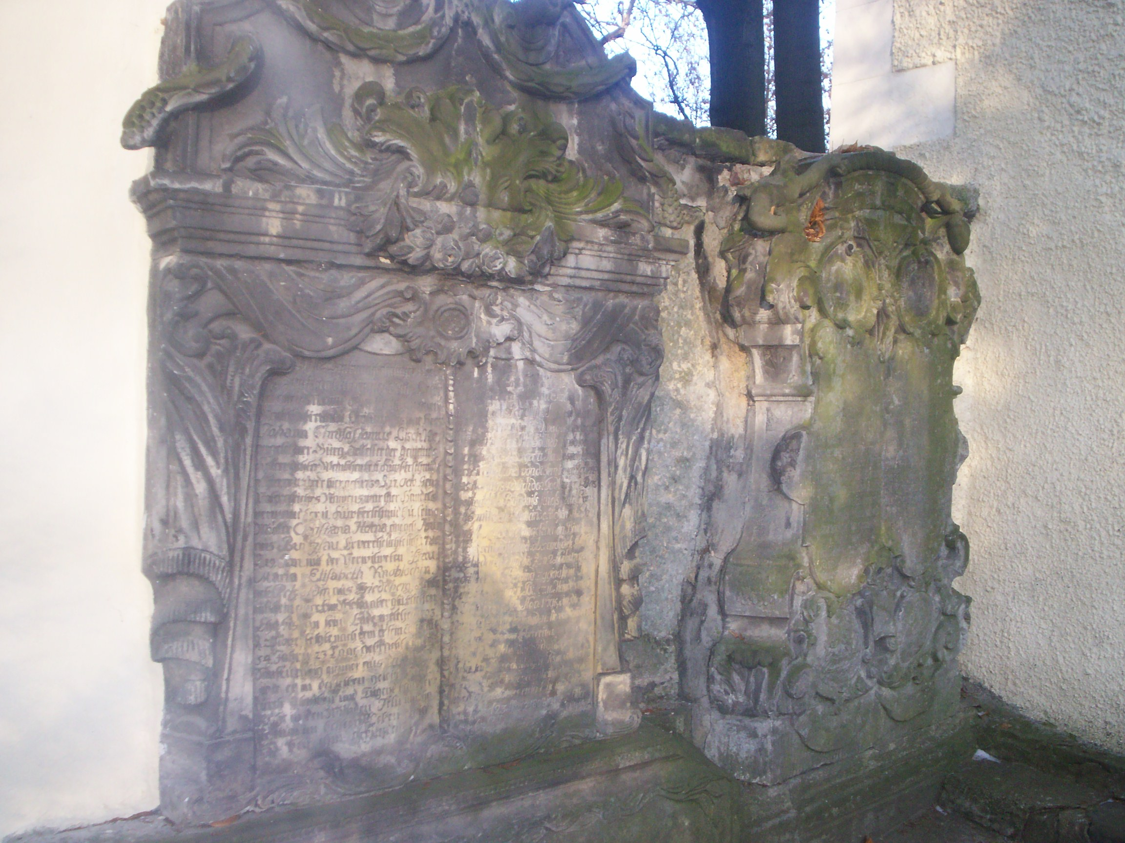 Lwówek Ślaski – epitafia na cmentarzu komunalnym.